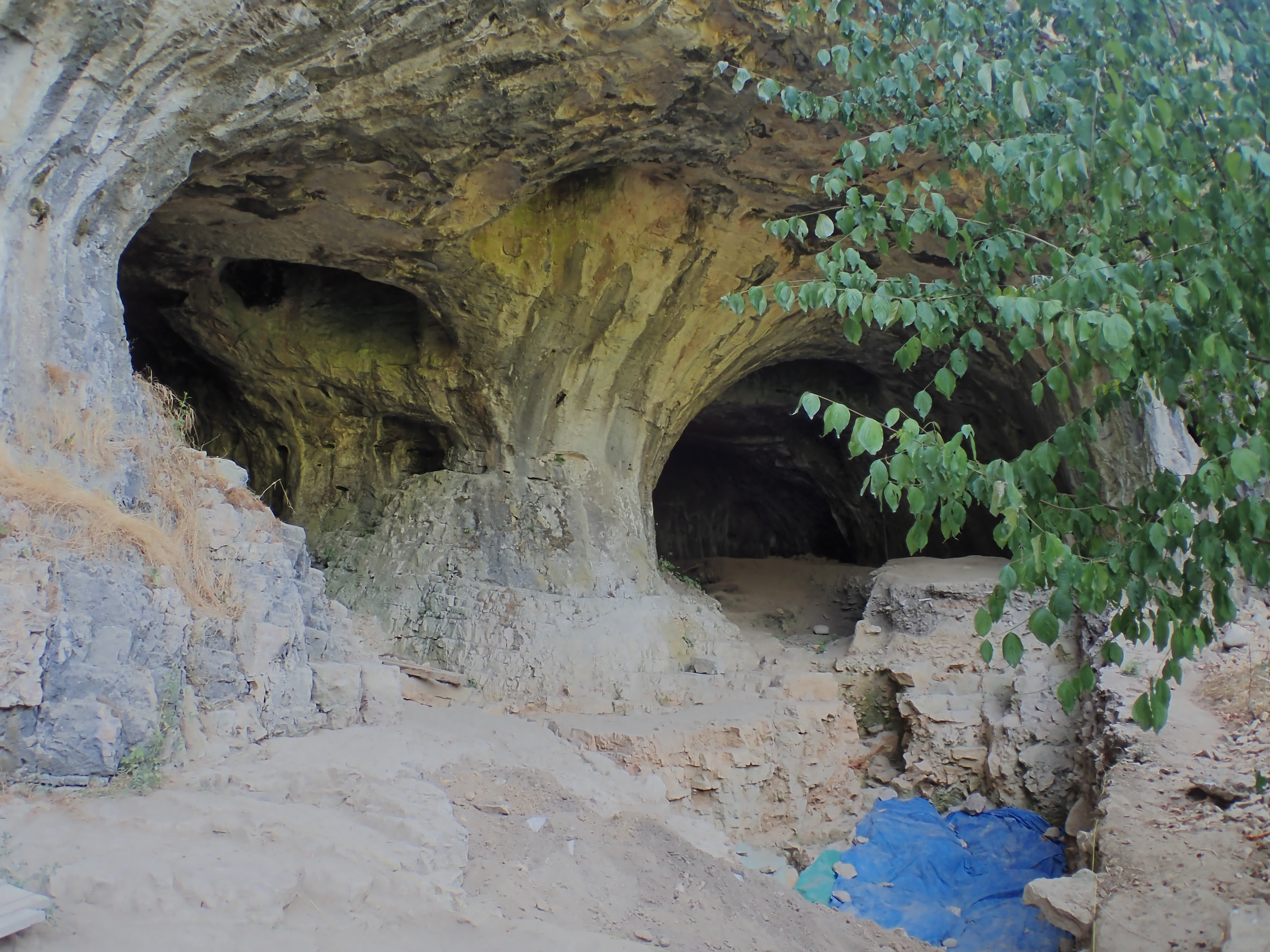 Šalitrena pećina